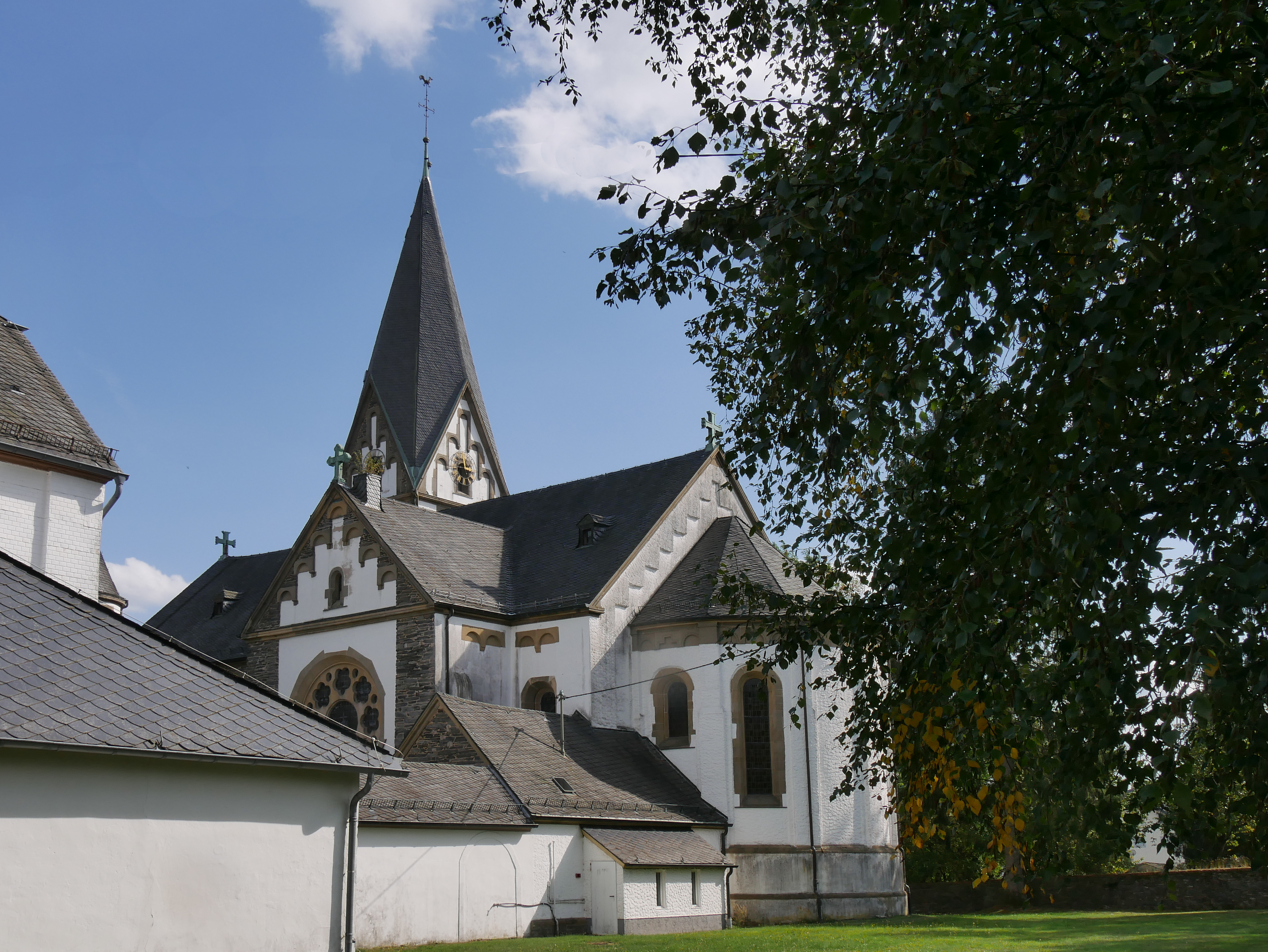 St. Remigius (Reinsfeld) bei Hermeskeil, Landkreis Trier-Saarburg